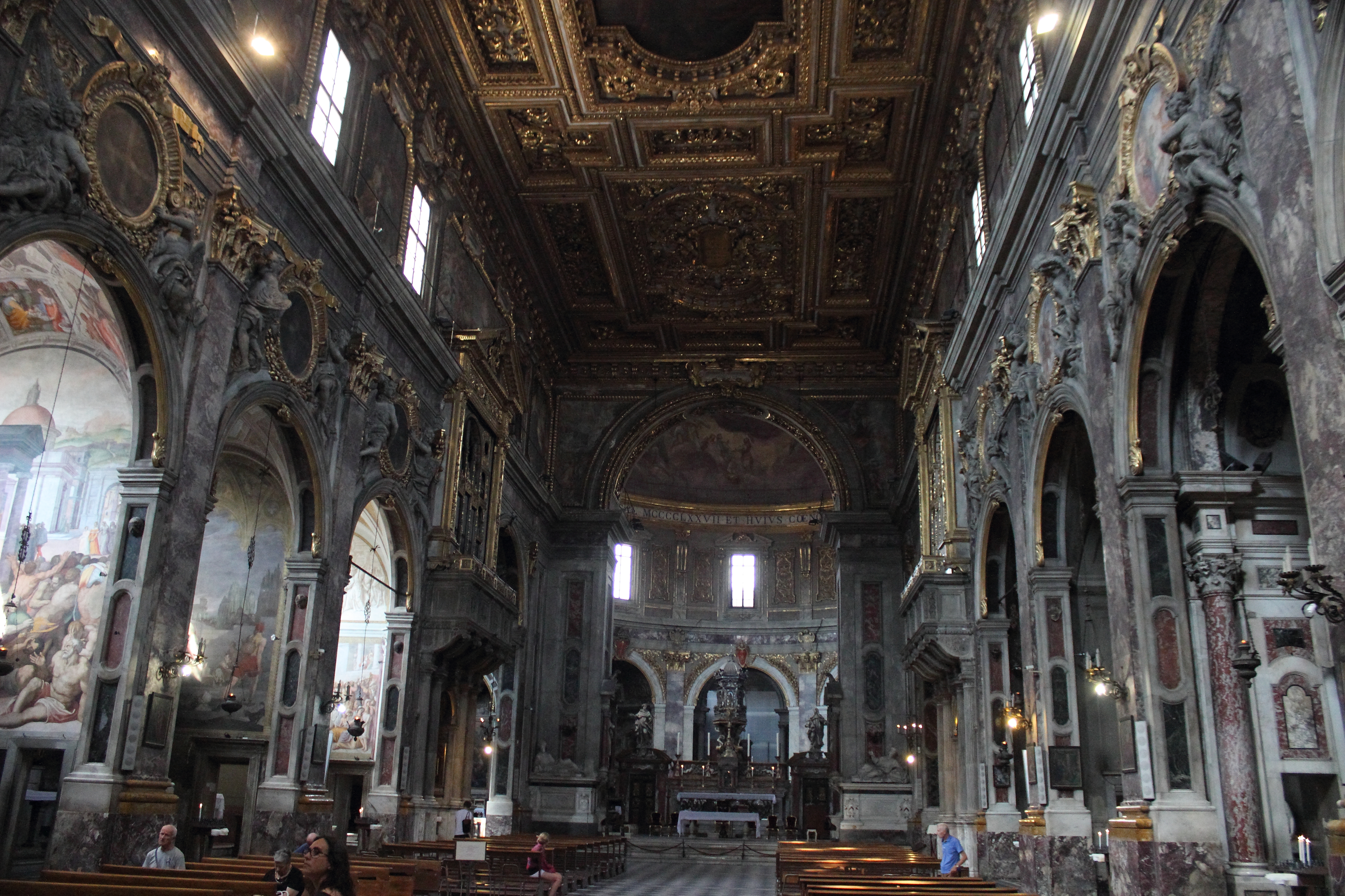 Florencia. Santissima Annunziata. Interior.